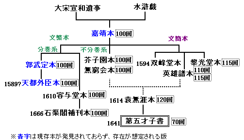 水滸伝刊本の系譜